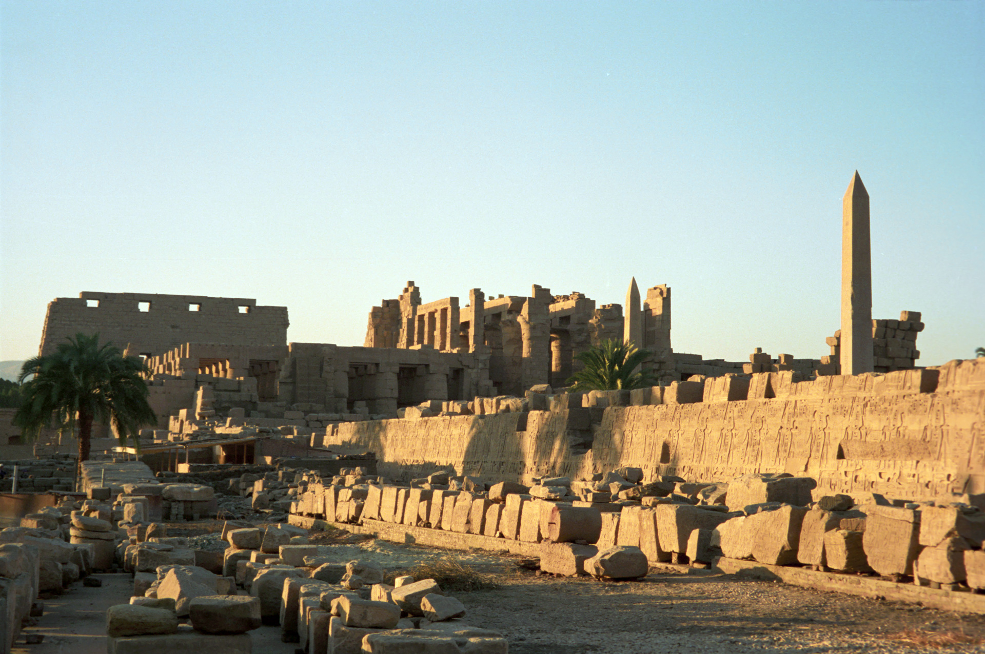 Karnak temple complex